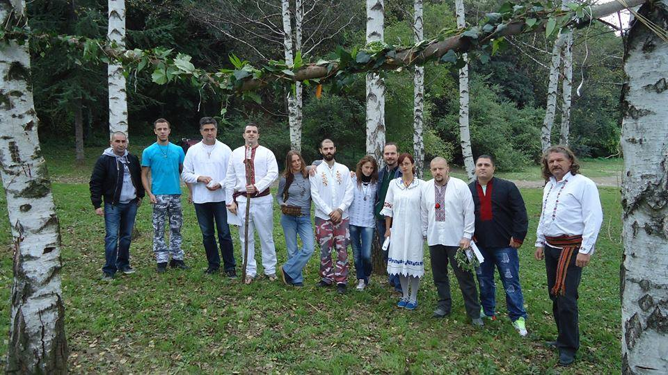 Српски (ћирилица): Родноверно венчање, Београд, 2014.